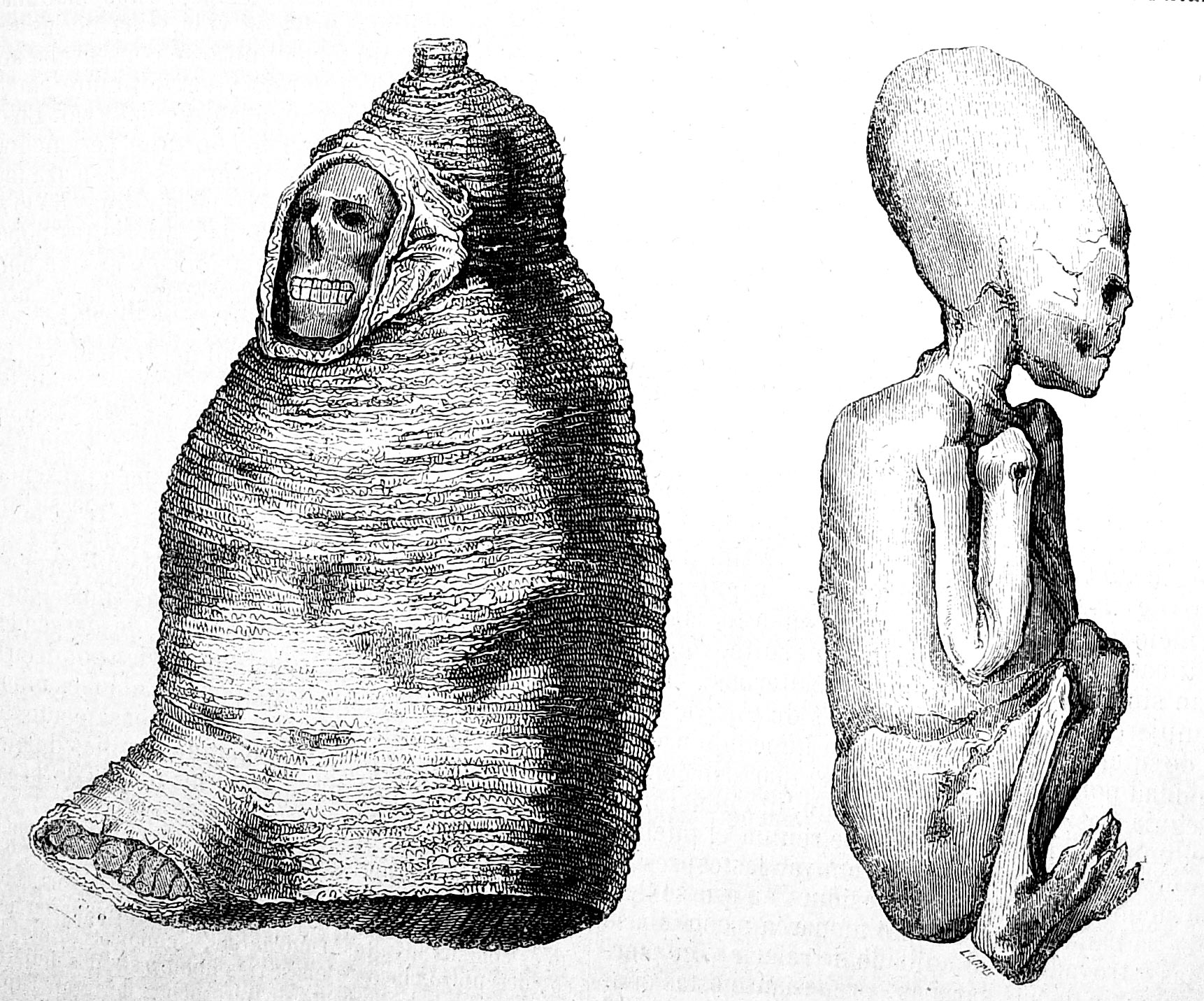 Puede acceder al libro completo en el siguiente enlace : Historia de la conquista del Perú : con observaciones preliminares sobre la civilización de los incas / por Guillermo H. Prescott. - Madrid : Gaspar y Roig, 1851